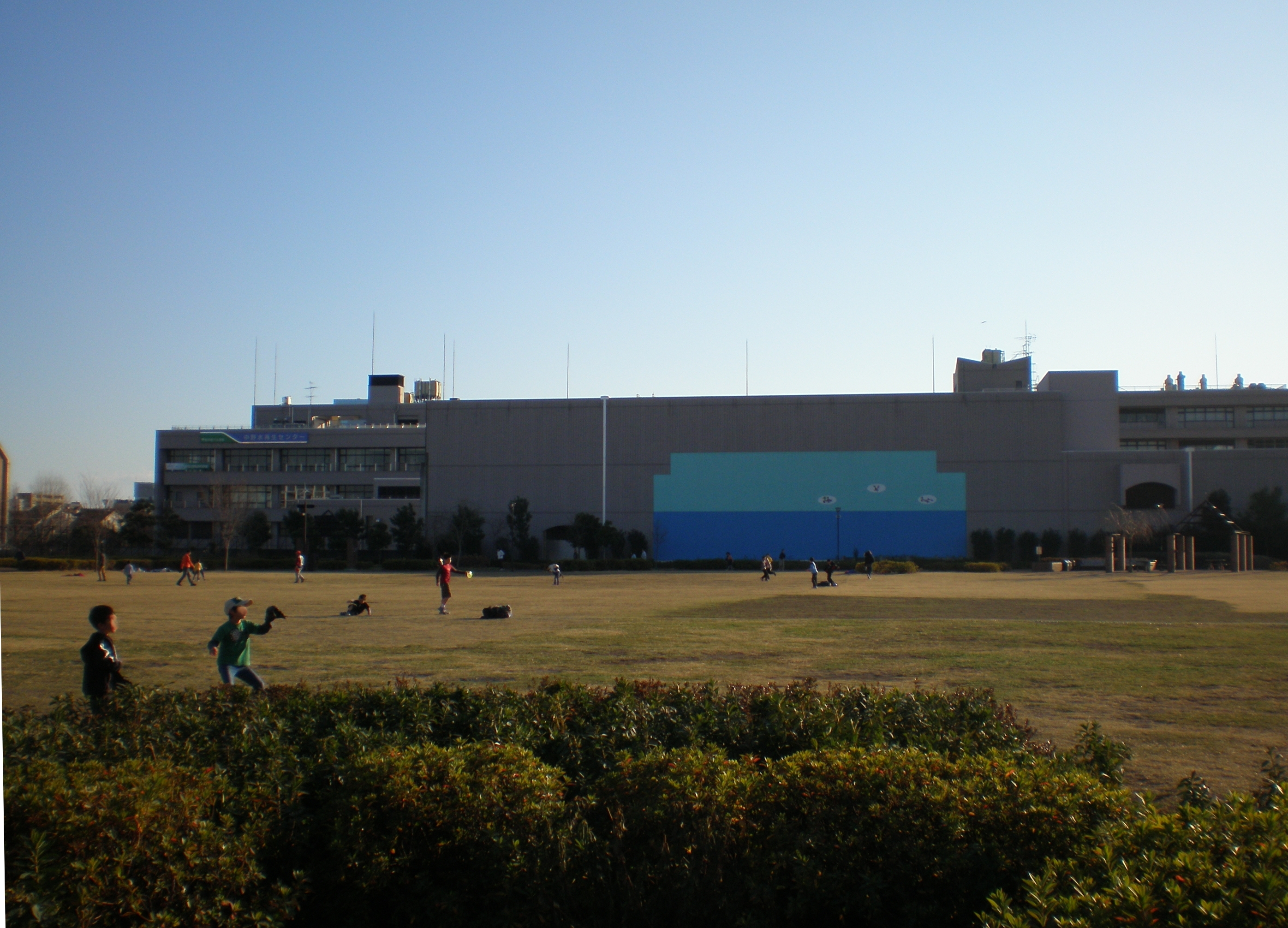 Heiwa no Mori Kouen and Nakano Sewage Farm Center in Nakano, Tokyo